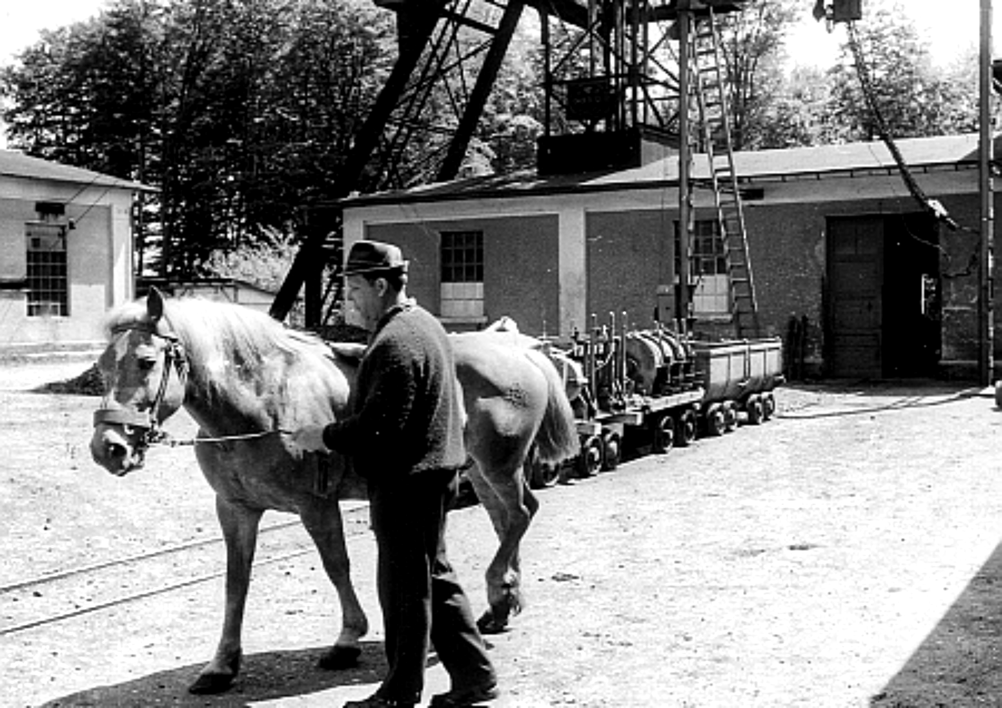 Grube Georg-Joseph bei Wirbelau. Im Hintergund Anlage des Groebler-Schachts. Untertage wurden bis zur Schließung der Grube 1966 ausschließlich Grubenpferde in der Förderung eingesetzt, da Lokomotiven nicht als wirtschaftlich angesehen wurden. Nur die Fernförderung durch den Wittekindstollen zur Aufbereitungsanlage erfolgte mit Lokomotiven. Aufnahme wahrscheinlich aus den 1960er Jahren.